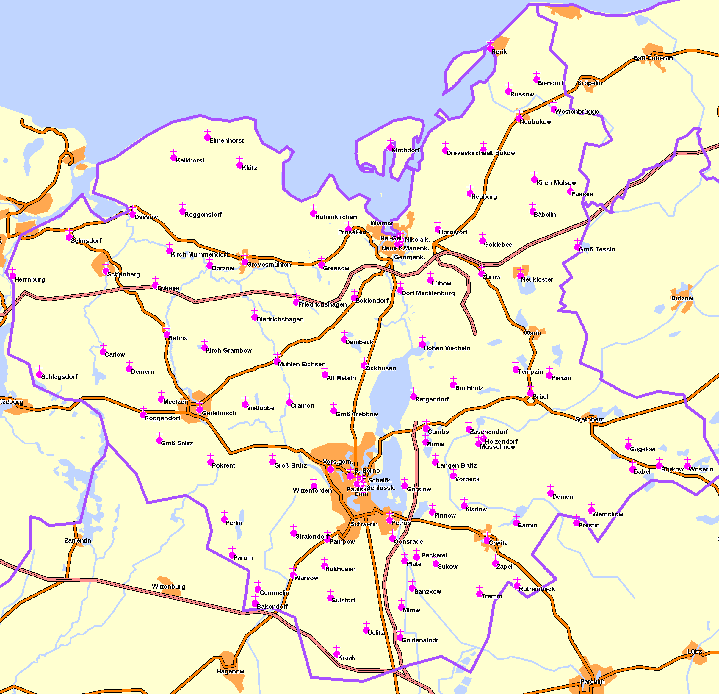 Karte der Propstei Wismar des Kirchenkreises Mecklenburg in der Nordkirche